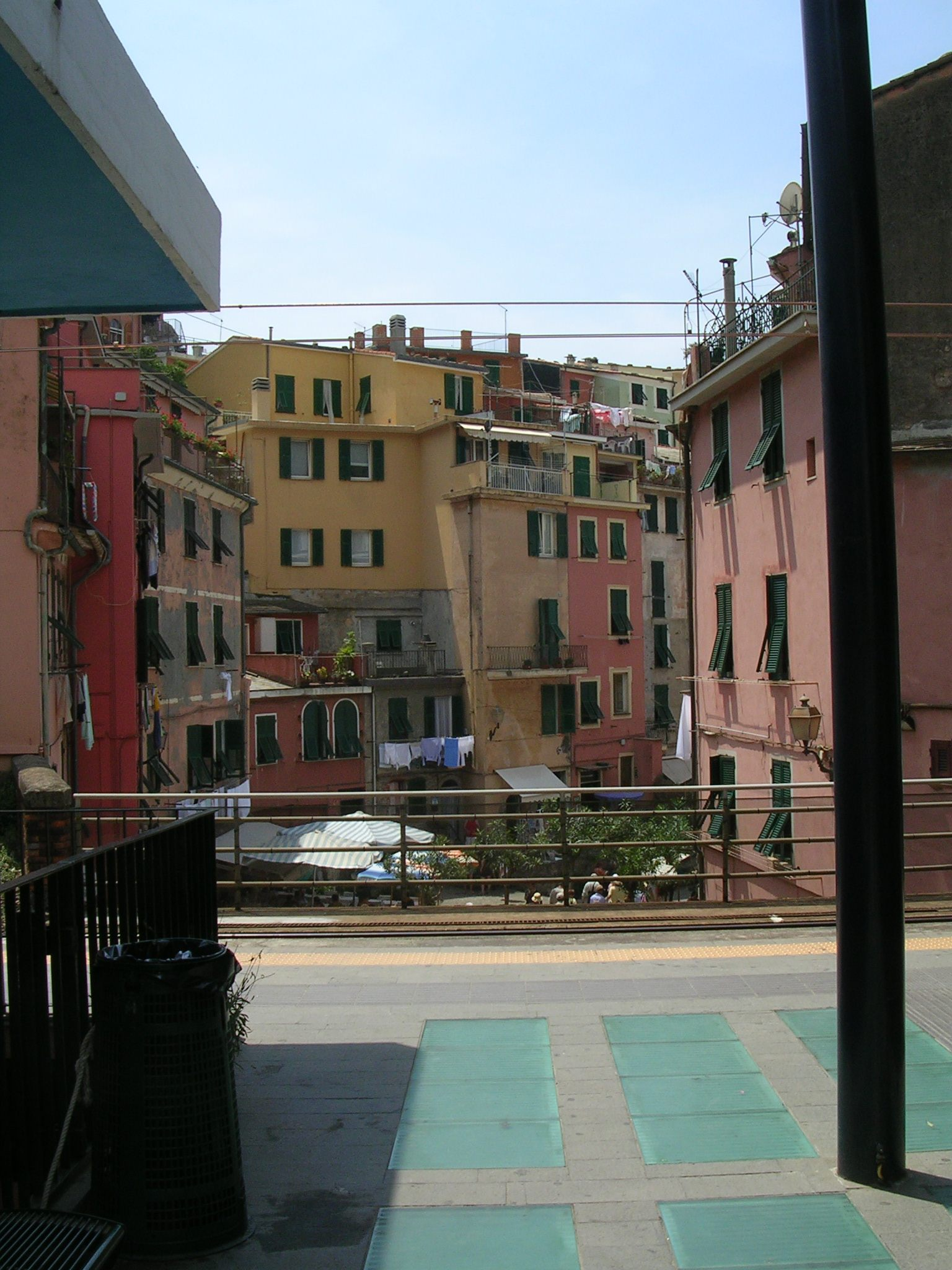 Scorcio dalla stazione.